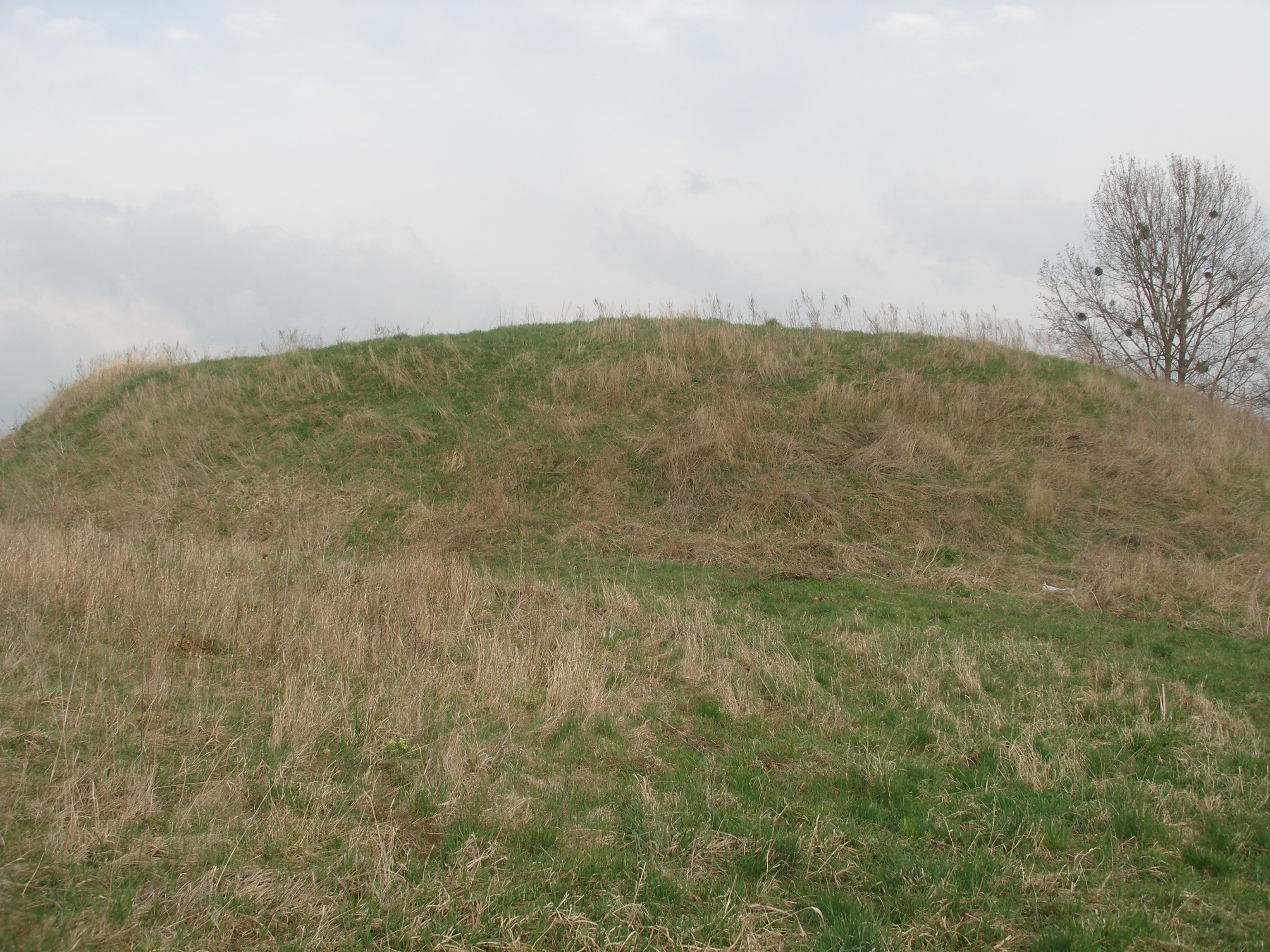 Zamczysko w Skierbieszowie